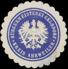 Sealing stamp Title: Bürgermeisterei Gelsdorf Kreis Ahrweiler Description: blau, weiß, geprägt Place: Gelsdorf size: 4 cm